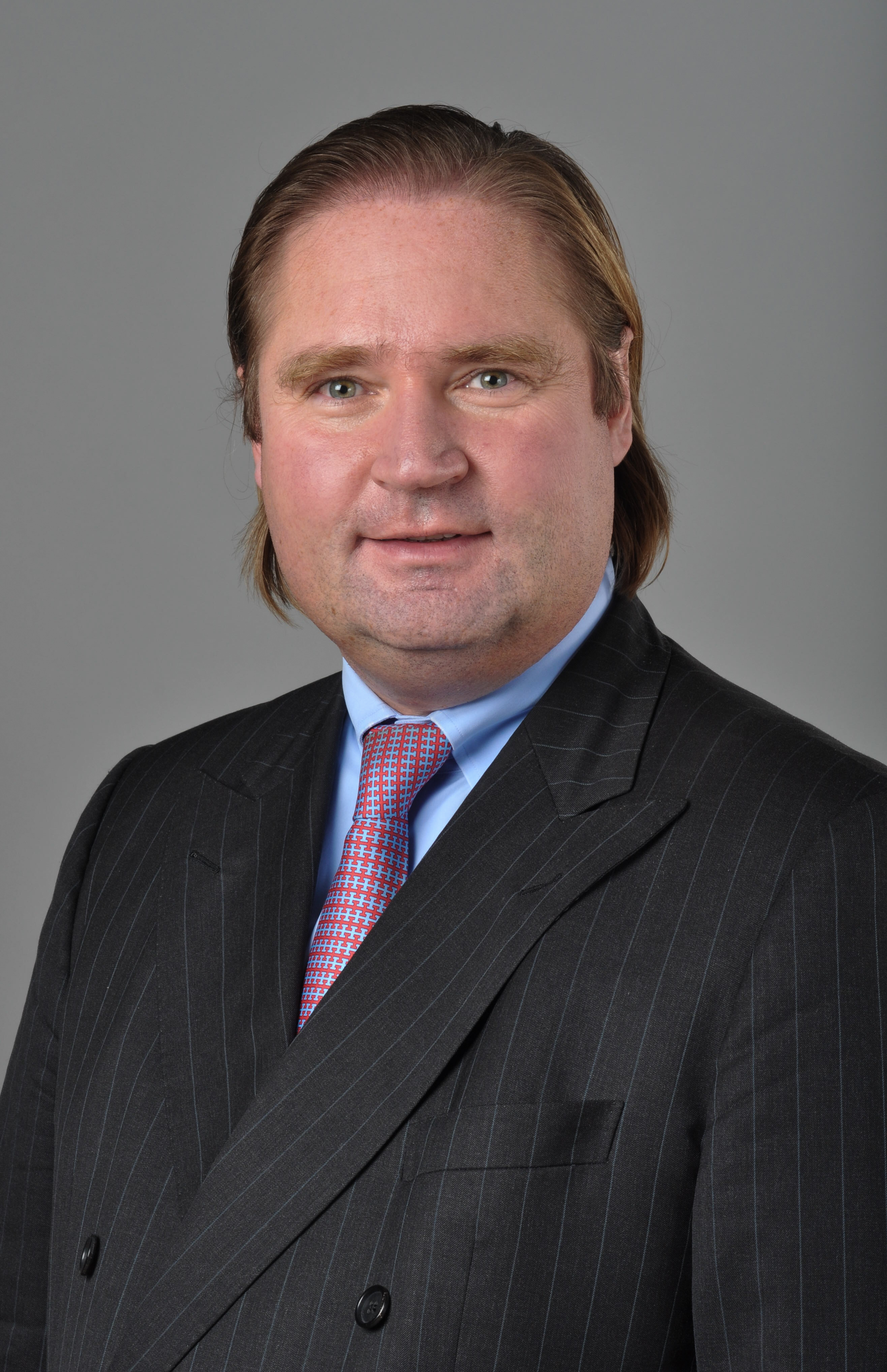 Lutz Lienenkämper, CDU